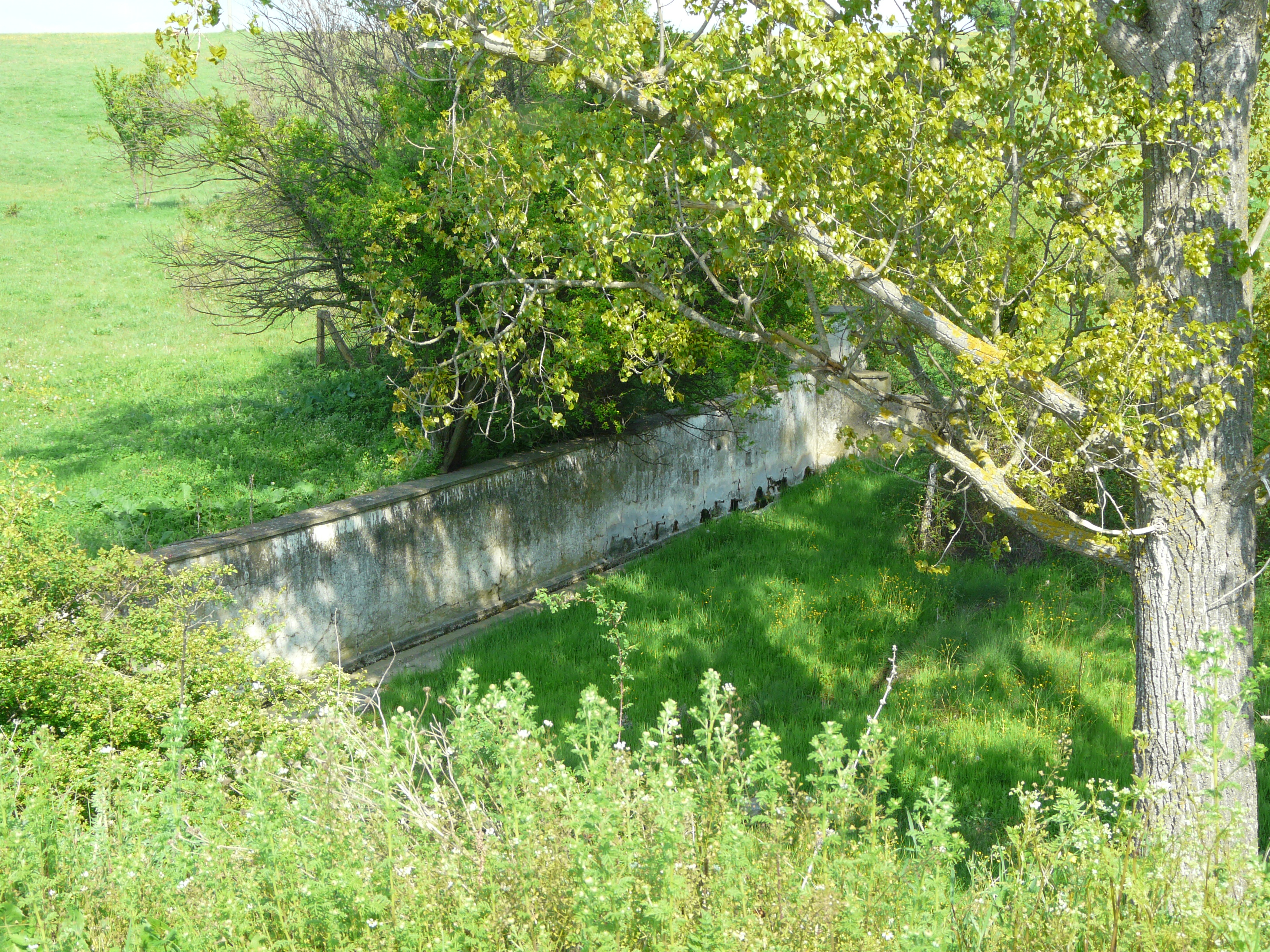 Чешмата с 12-те чучура, с. Малко Кирилово, Ямбол, България